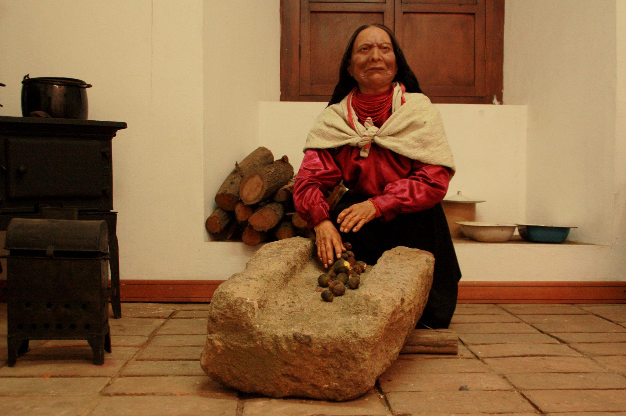 Escultura de cera, Ambato